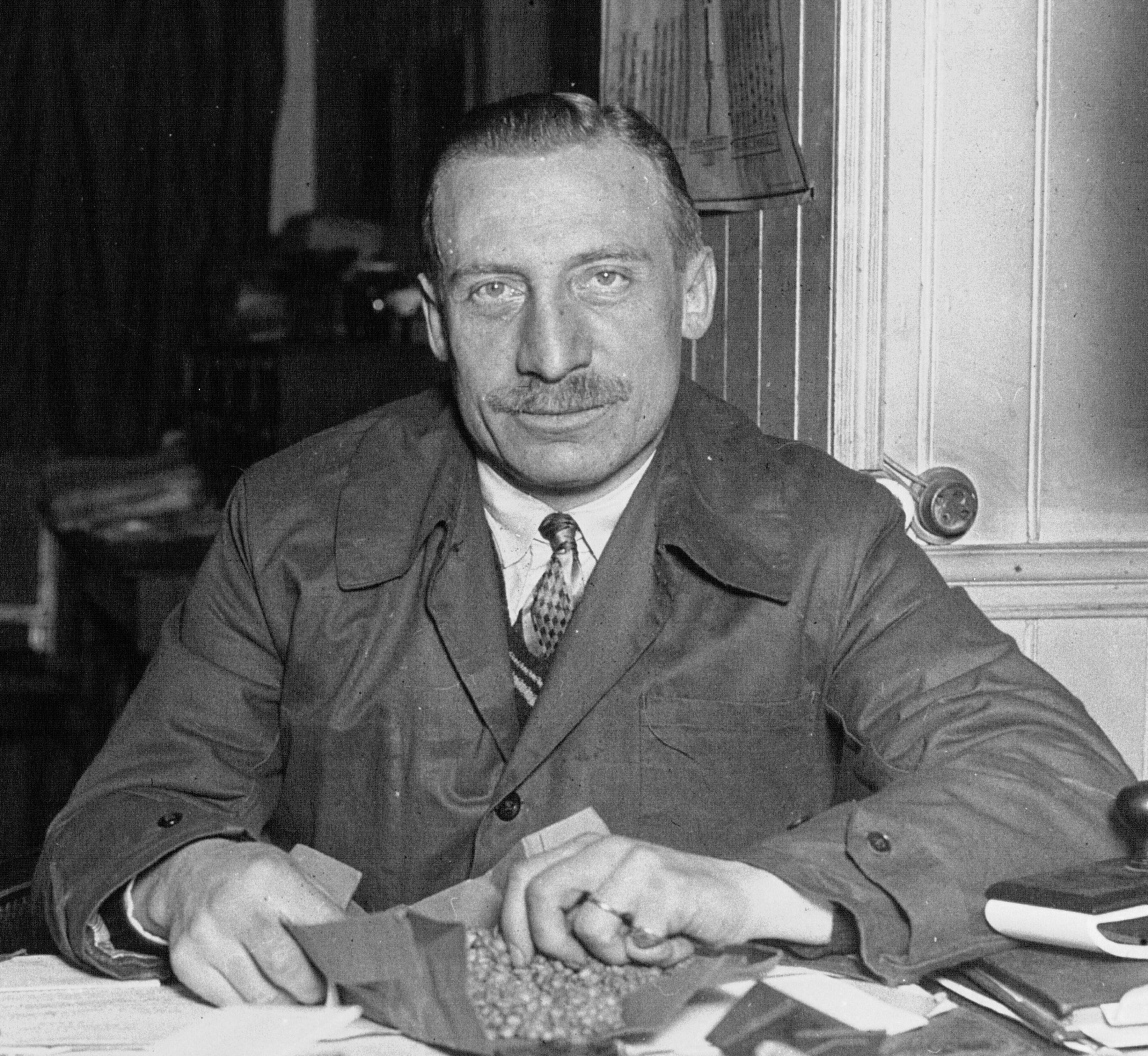 René Mourlon : [photographie de presse] / Agence Meurisse